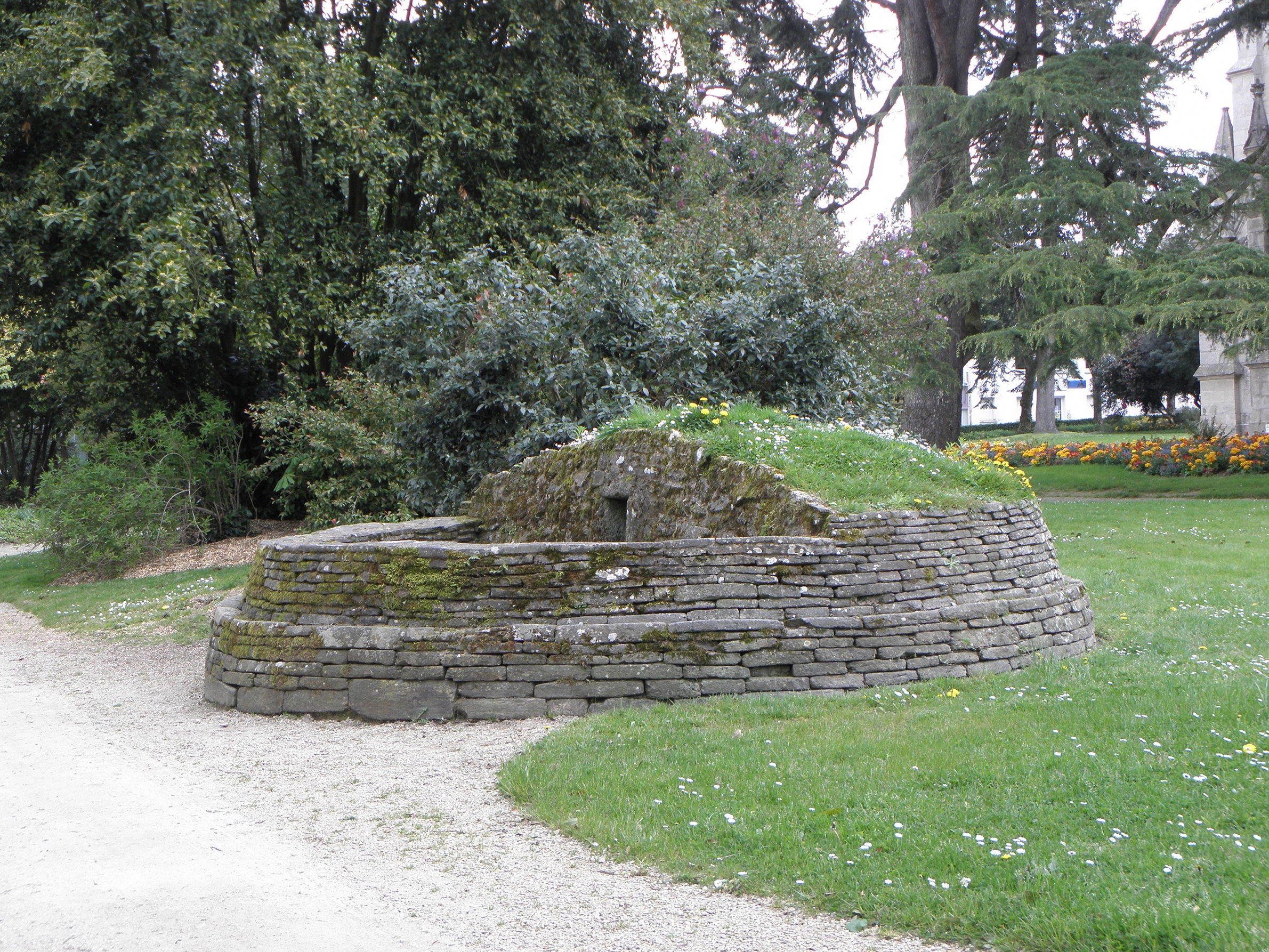 Tumulus de Nizillien sis square Saint-Joseph à Pontivy (56).